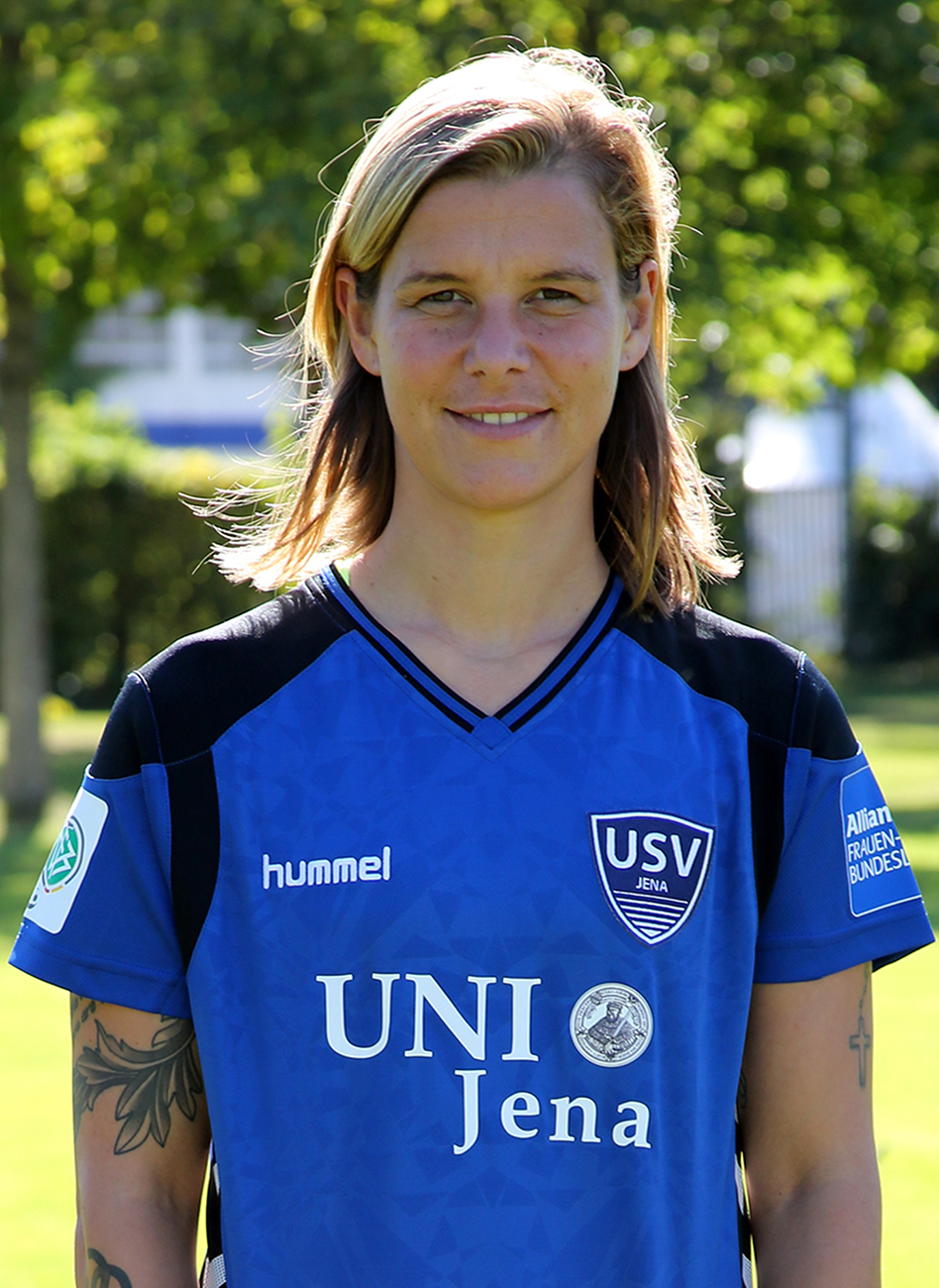 Patricia Hanebeck 2016 FF USV Jena